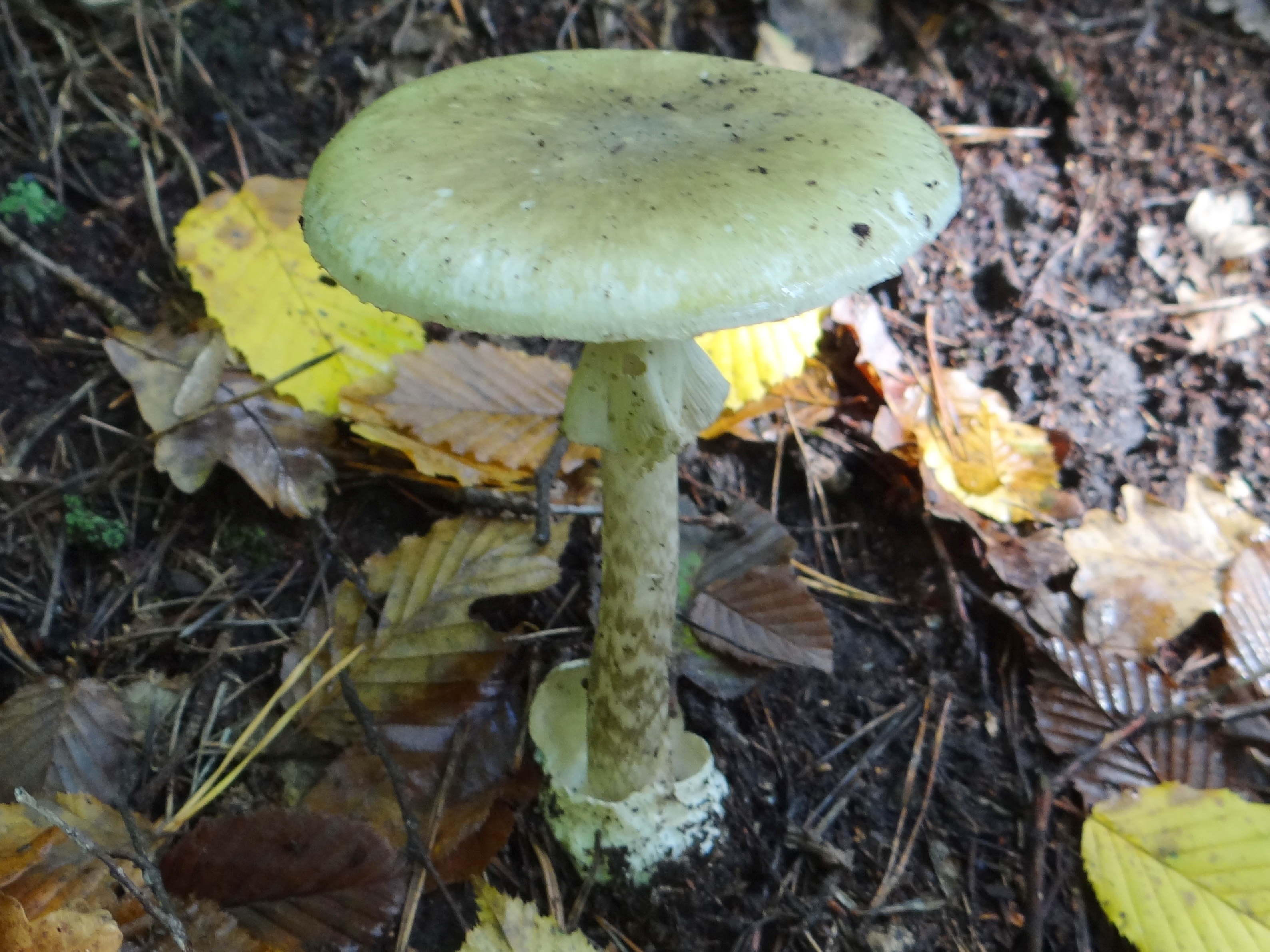 Amanita phalloides (location: Poland, Leszczyna, województwo małopolskie)